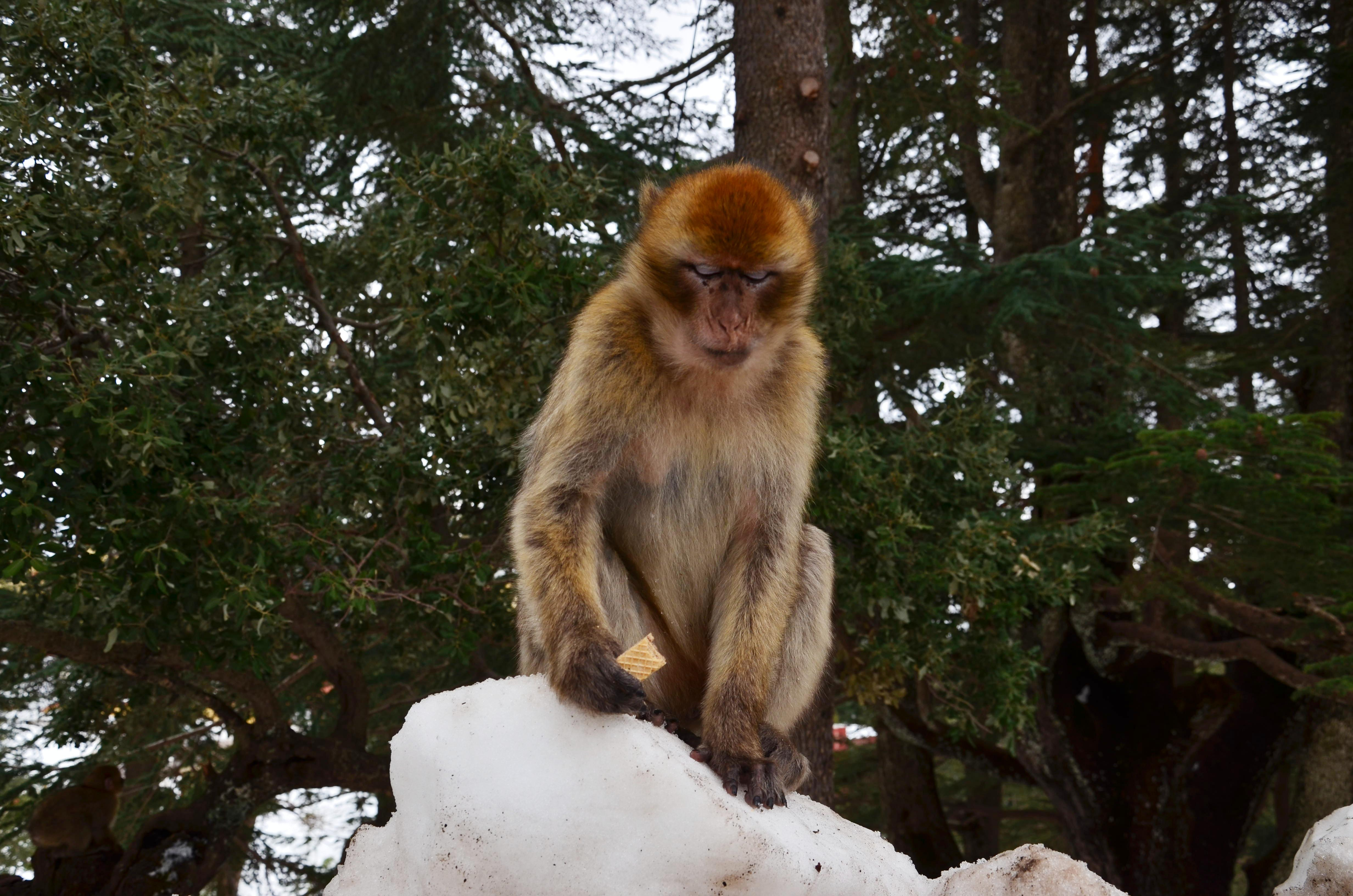 SINGE CHERCHANT A MANGER AUPRES DES TOURISTES